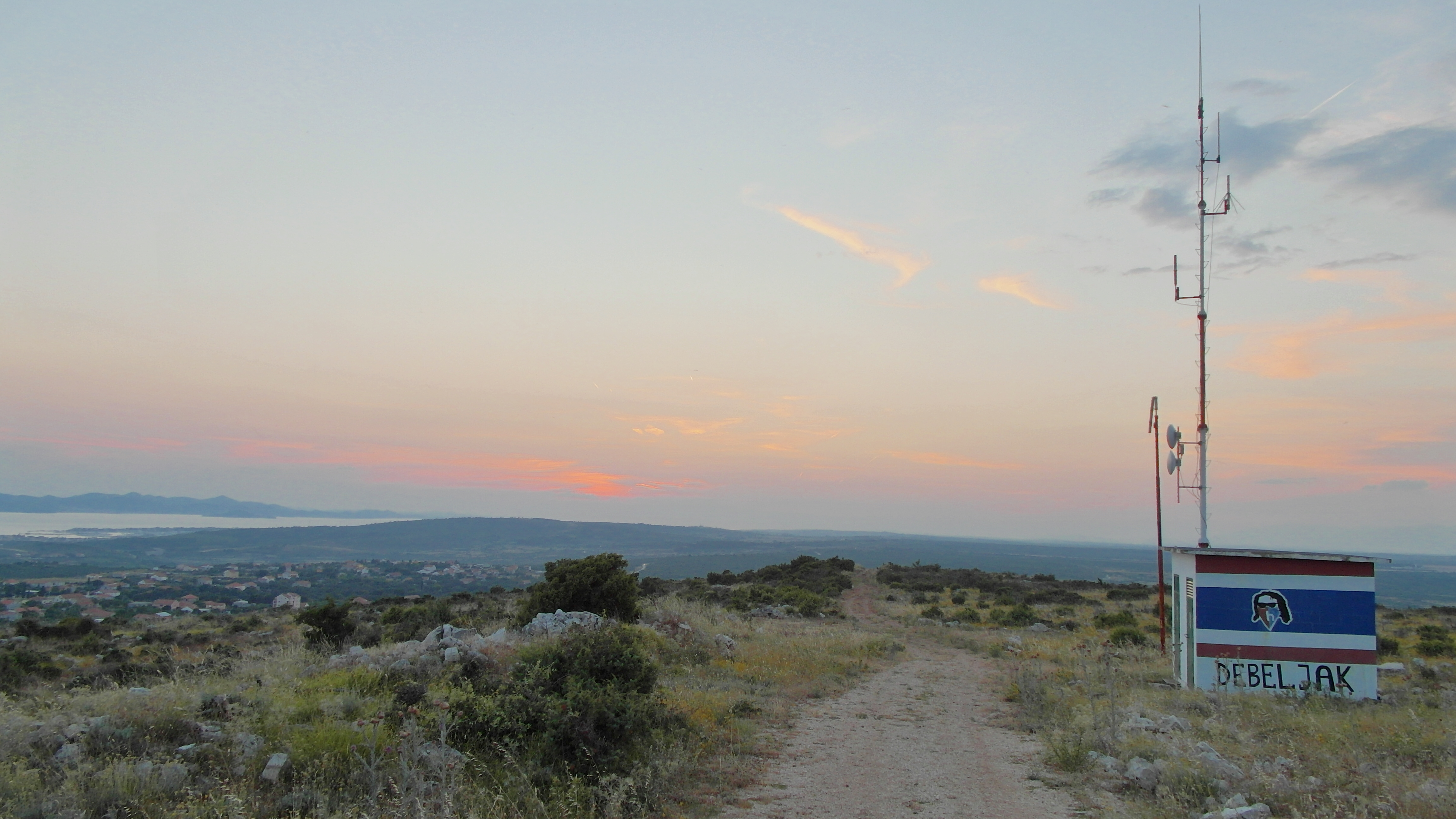 GRAFFITY